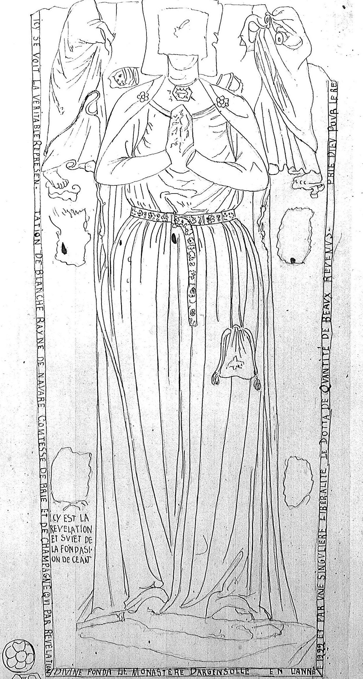 Blanche de champagne gisant d argensolles déplacé à CHâlons-sur-Marne.